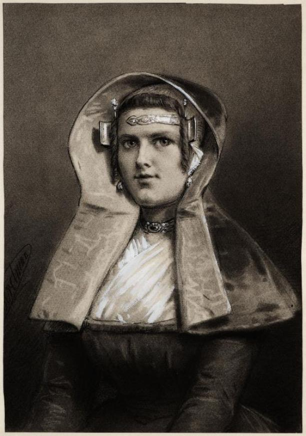 Zaans meisje, 1875-1926 Purmerend. Zij draagt een kaper, oorijzers en een voorhoofdsnaald. Krijttekening door Otto Eerelman